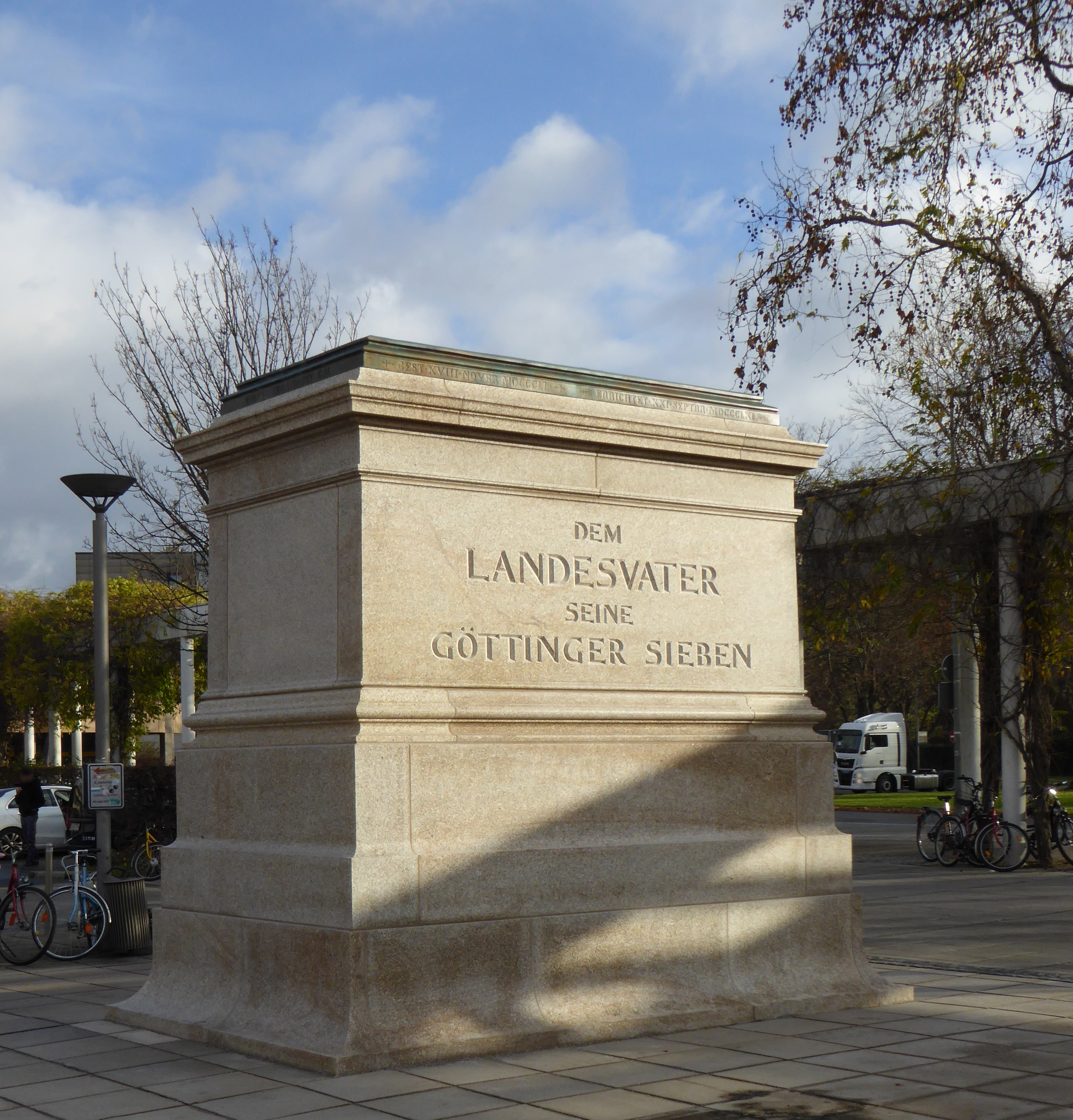 Leerer Denkmalsockel "Dem Landesvater seine Göttinger Sieben" in Göttingen, Bahnhofsvorplatz. Erbaut 2015 nach langer kontroverser Diskussion, enthüllt 19. November 2015. Künstlerin: Christiane Möbus. Kopie des Sockels des Ernst-August-Denkmals auf dem Bahnhofsvorplatz in Hannover mit abgewandelter Inschrift "Dem Landesvater seine Göttinger Sieben" und den Namen der Göttinger Sieben sowie der Künstlerin auf der anderen Seite.